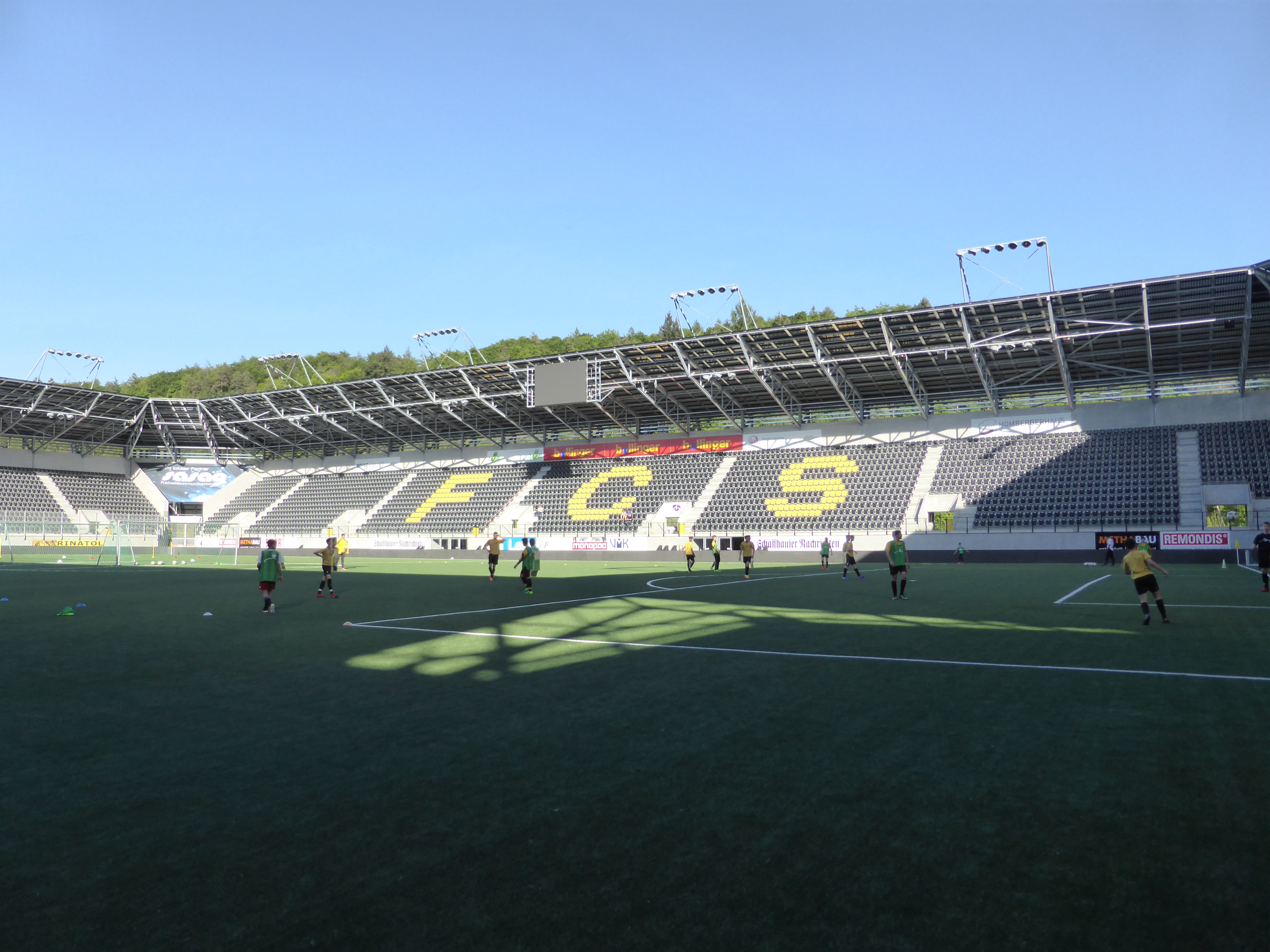 Lipo Park Schaffhausen, das Fussballstadion in Schaffhausen